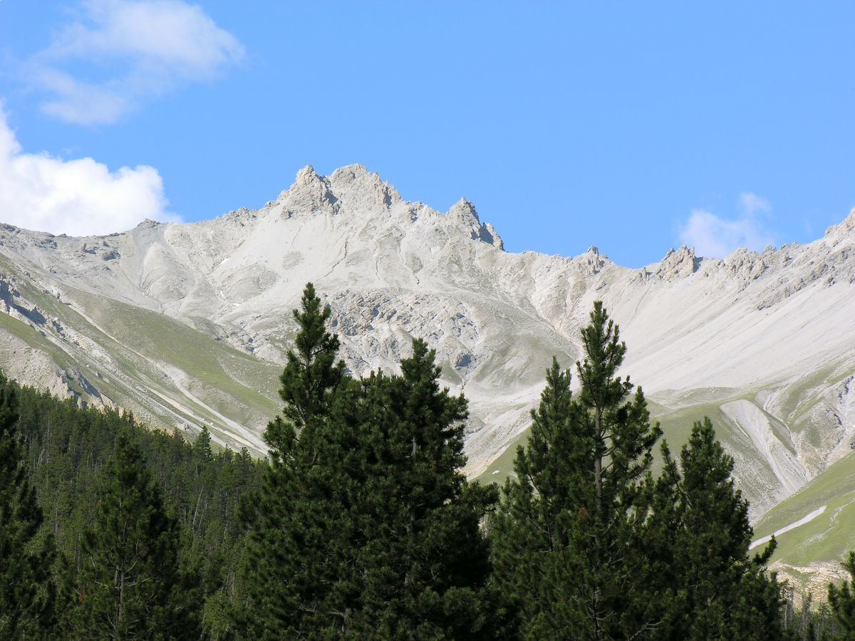 Switzerland, Graubünden, Swiss National Park